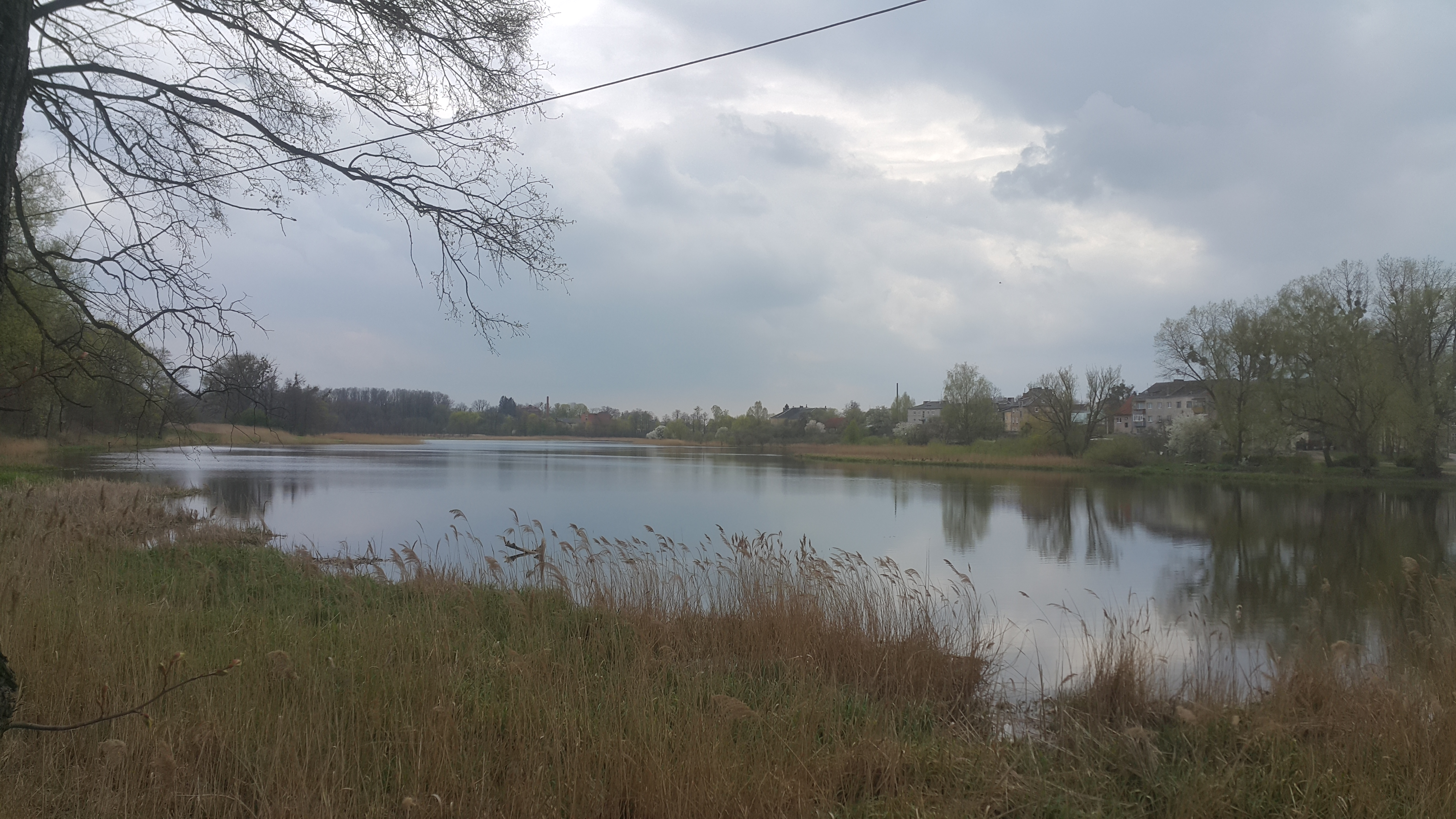 Парк 'Железнодорожный', Правдинский район This image is related to the protected area of Russia number 3910085